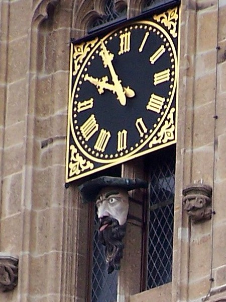 Der berühmte „Platz-Jabbeck“, eine holzgeschnitzte Fratze, am Kölner Rathausturm, die bei jedem Stundenschlag der Turmuhr das Maul aufreißt und ihre Zunge herausstreckt